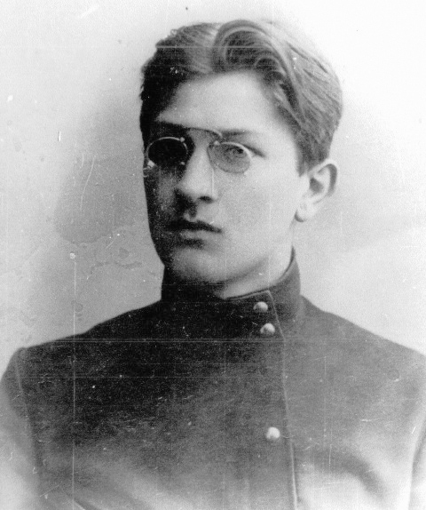 Михаил Васильевич Винокуров (1890-1955) - учёный в области железнодорожного транспорта, генерал-директор тяги II ранга, доктор технических наук, профессор. Фото сделано во время учёбы в Пензенском реальном училище.